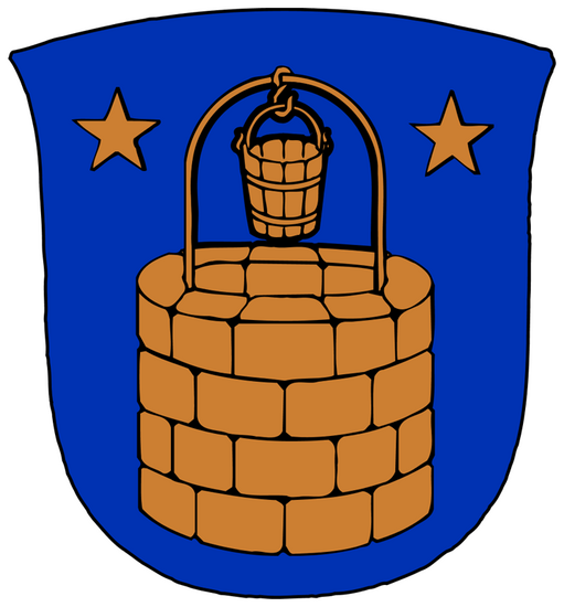 Shield of Brøndby Municipality (2007)